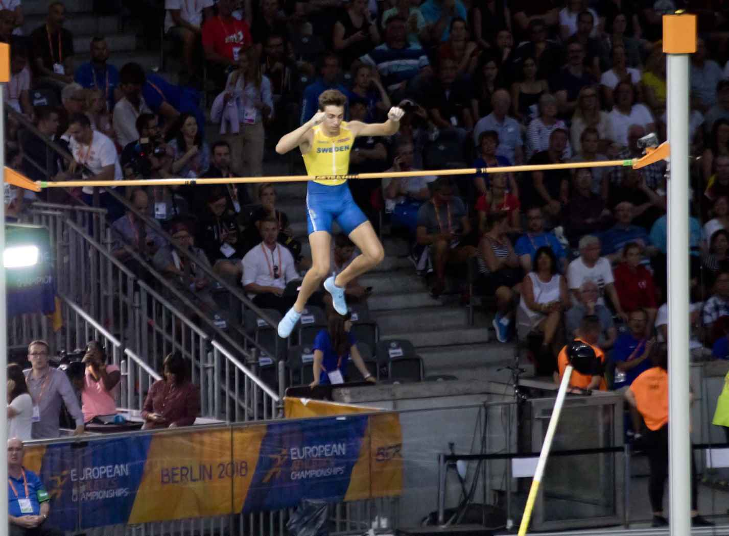 EKB53062 duplantis